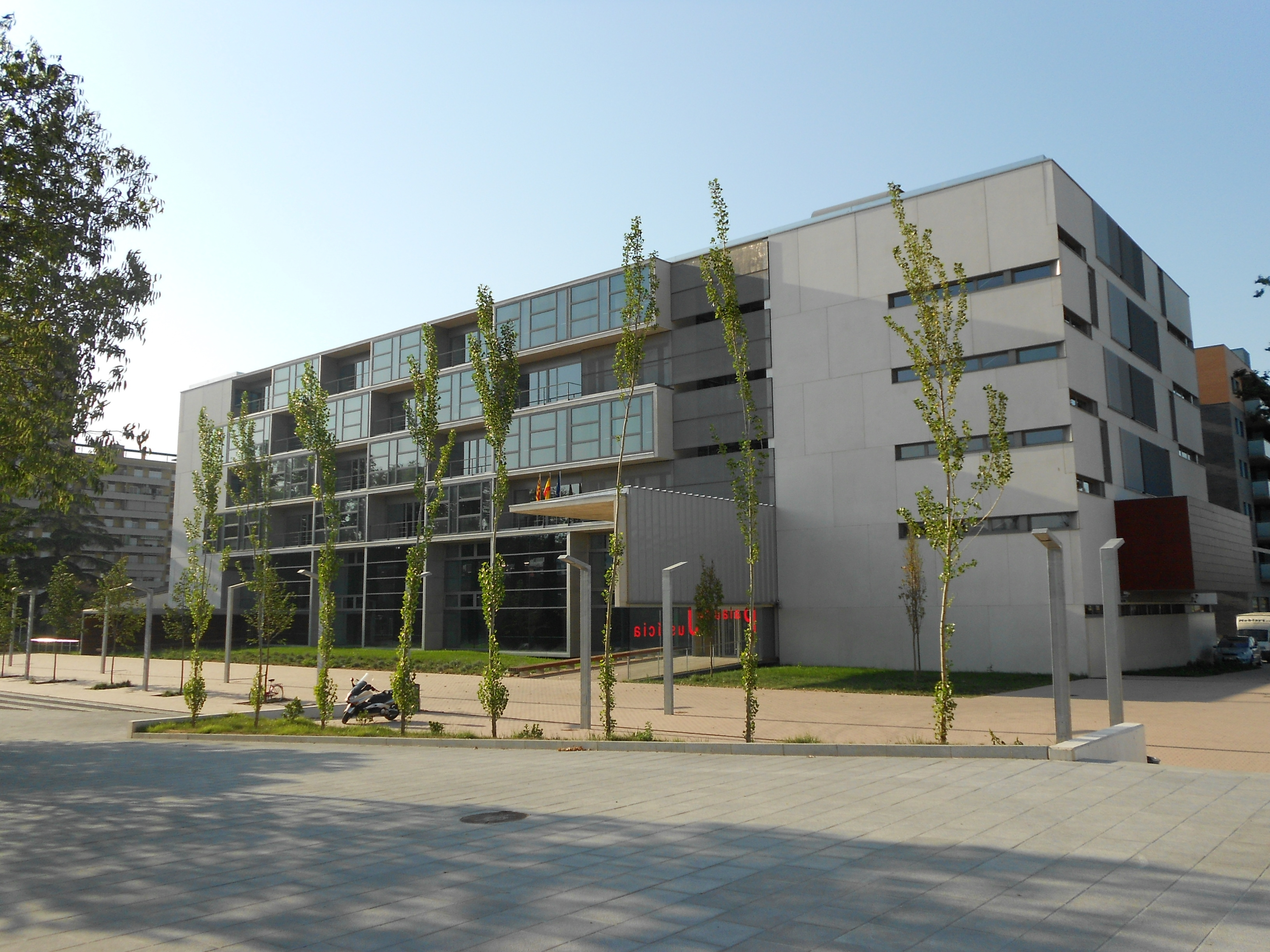 Nou Palau de Justícia de Girona, inaugurat el 2012, on es troba l'Audiència Provincial.